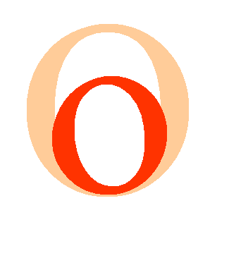 Greek letter